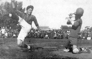 Segundo campo de juego y primera "cancha" de Colón de Santa Fe.